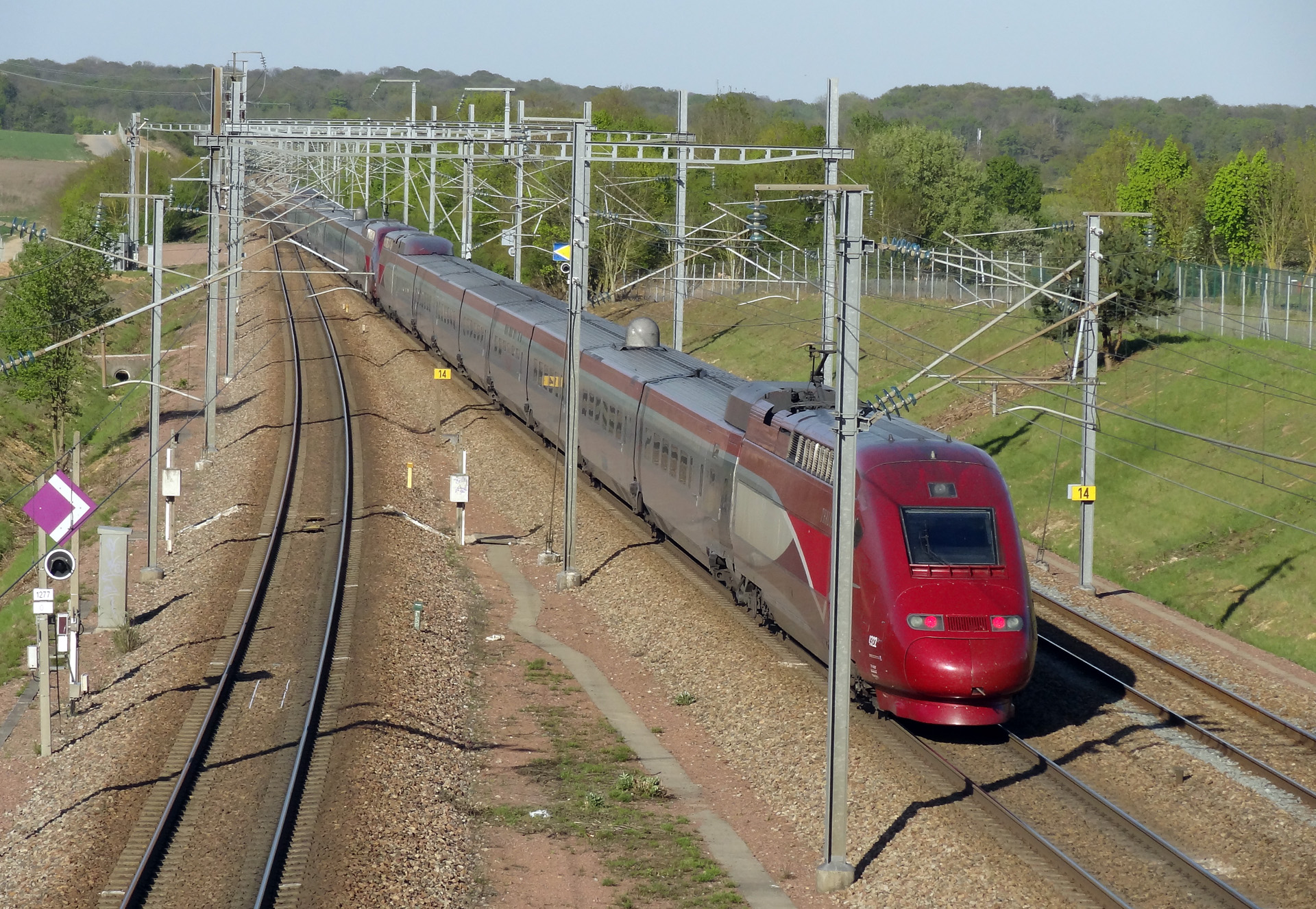 Une rame TGV PBKA se dirige vers Bruxelles sur la LGV Nord, à hauteur du triangle de Vémars, à Moussy-le-Neuf (Seine-et-Marne), France.